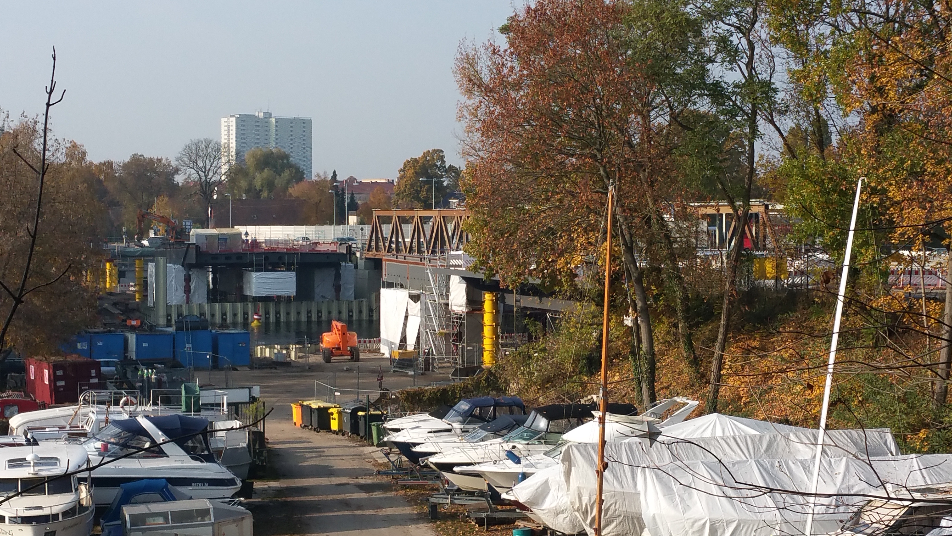 Bauarbeiten an der neuen Freybrücke. Montage der beiden Lager.